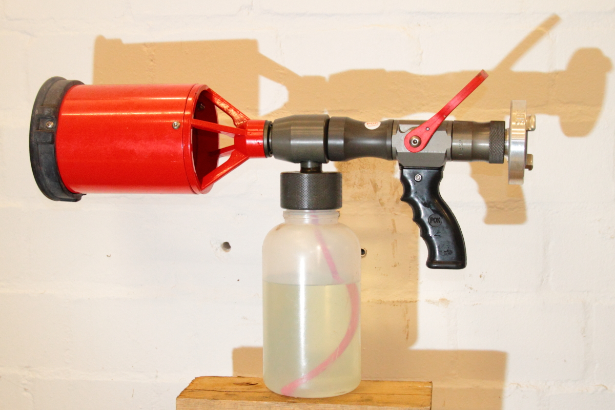 Feuerwehr Schaumpistole